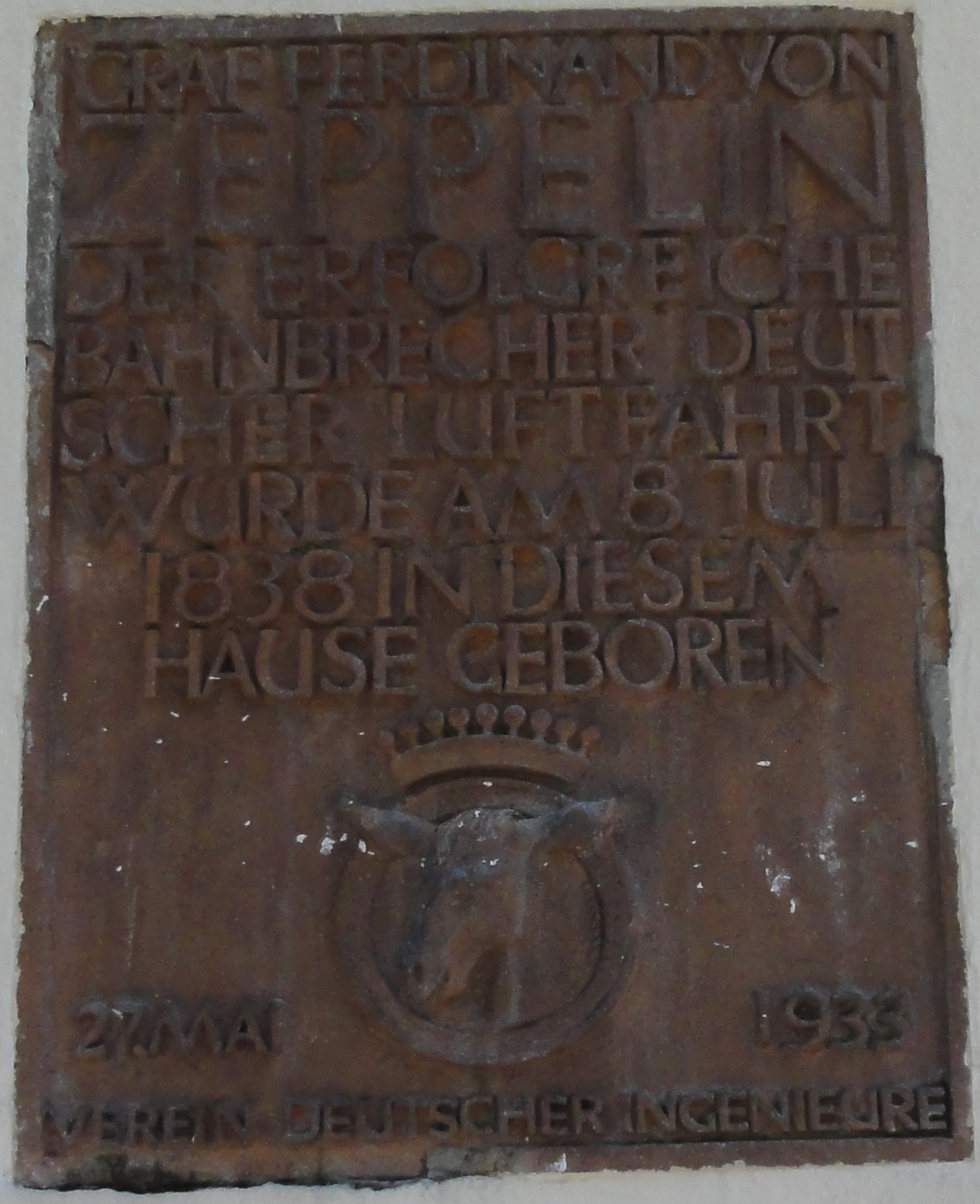 Konstanz — Gedenkplatte am Geburtshaus von Ferdinand Graf von Zeppelin (Auf der Insel 1, heute Steigenberger Inselhotel, Dominikanerinsel im Bodensee, Konstanz, Altstadt)Inschrift:GRAF FERDINAND VONZEPPELINDER ERFOLGREICHEBAHNBRECHER DEUTSCHER LUFTFAHRTWURDE AM 8. JULI1838 IN DIESEMHAUSE GEBOREN.27. MAI 1935VEREIN DEUTSCHER INGENIEURE GPS data may be inaccurate. EXIF data regarding date and time may be inaccurate.